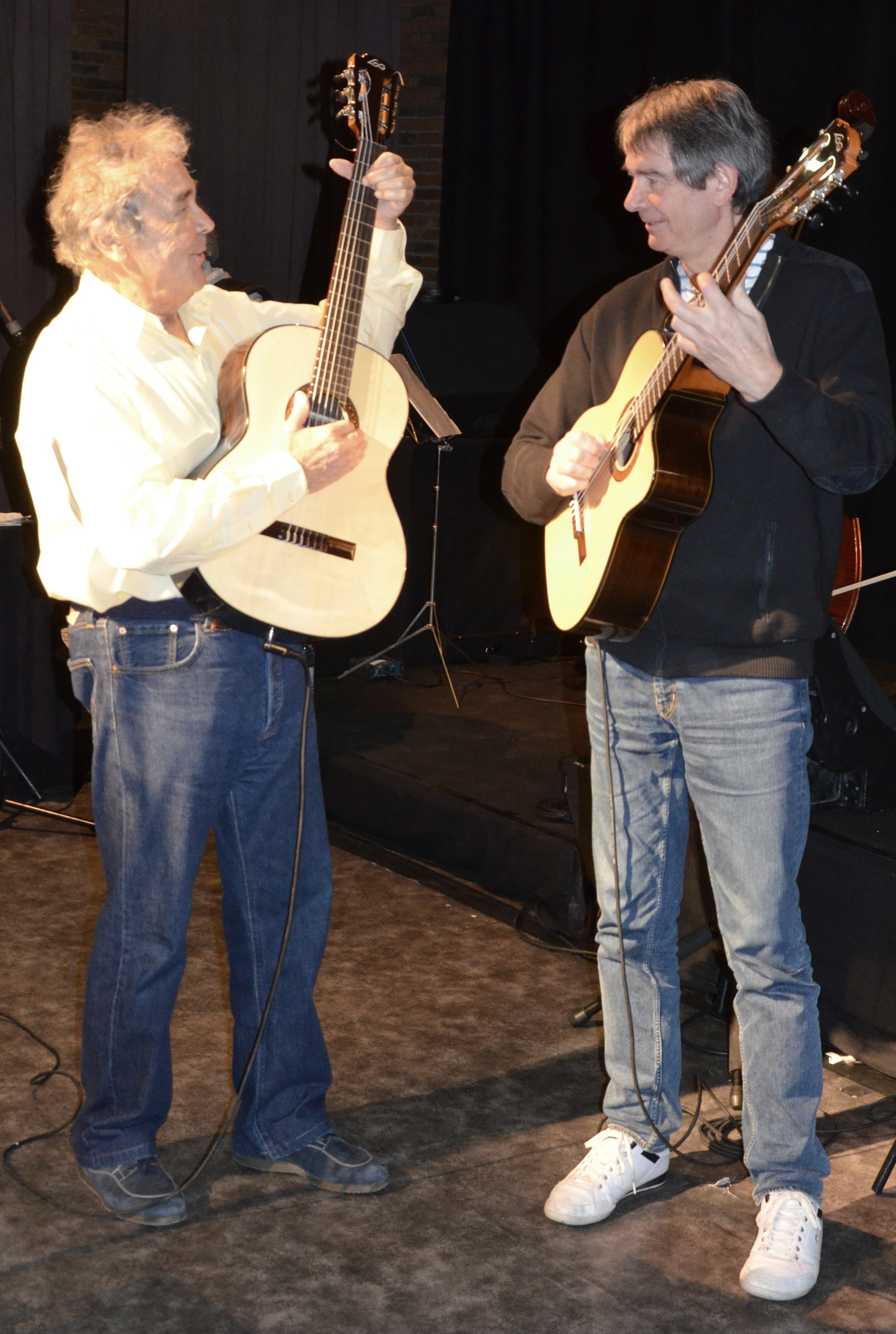 Pierre Perret accorde sa guitare avec Joël Roulleau lors des répétitions avant le spectacle à La Salle culturelle de La Sentinelle.